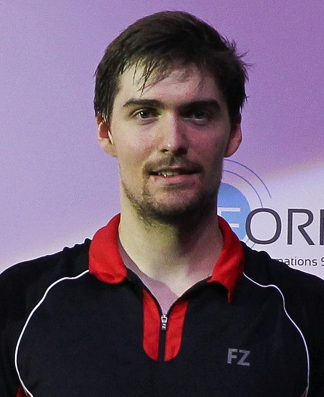 Mathias Christiansen le 3 avril 2016.